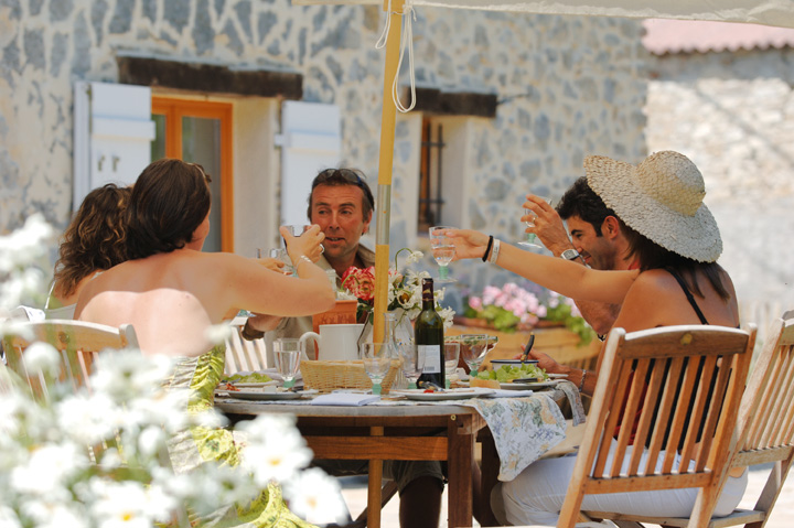 Ambiance apéro